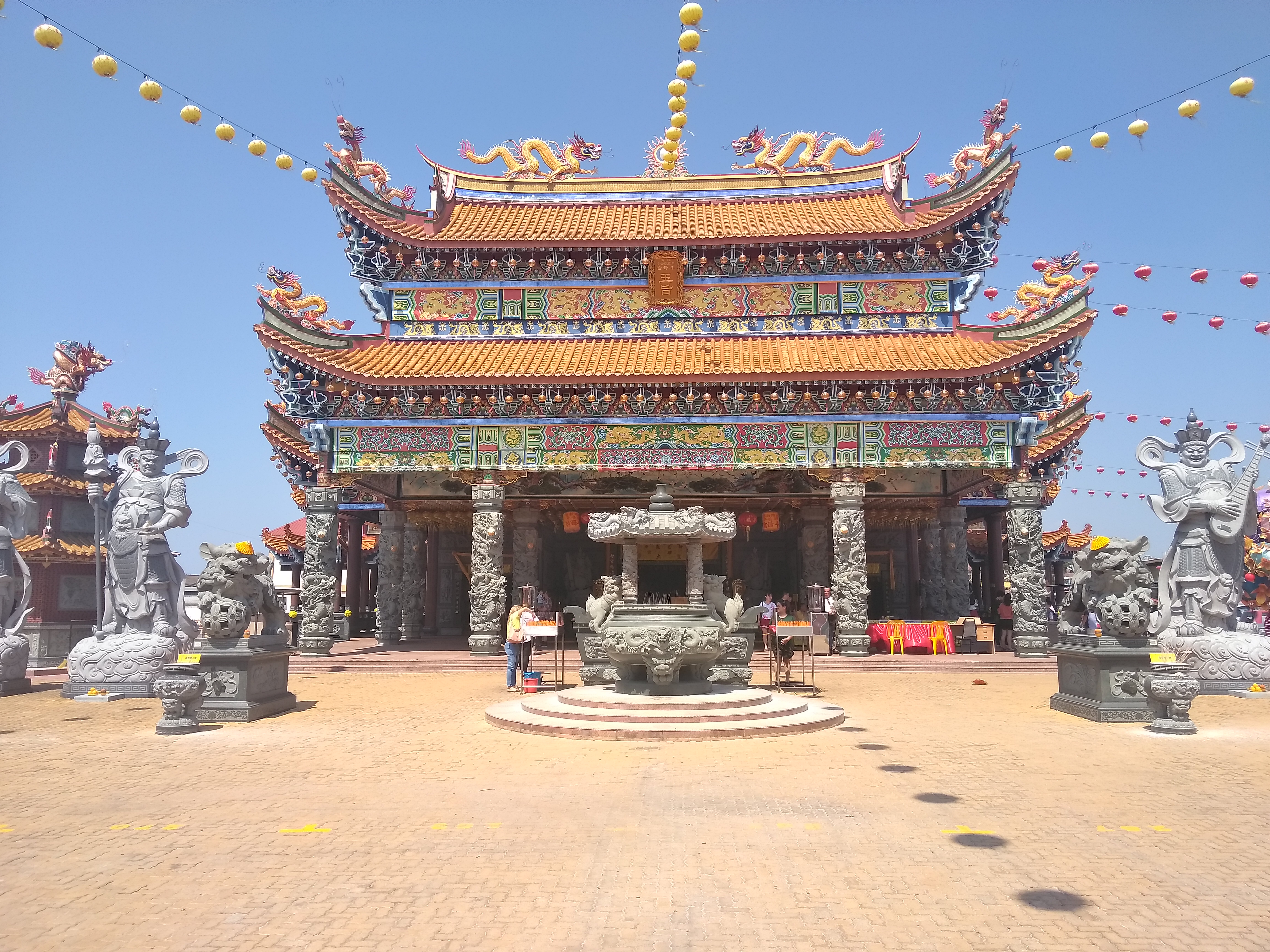 中文（马来西亚）: 北海新芭观音亭斗母宫